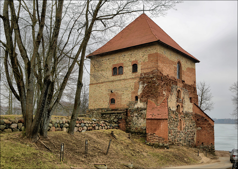 Тракайскія краявіды. Паўастраўны замак